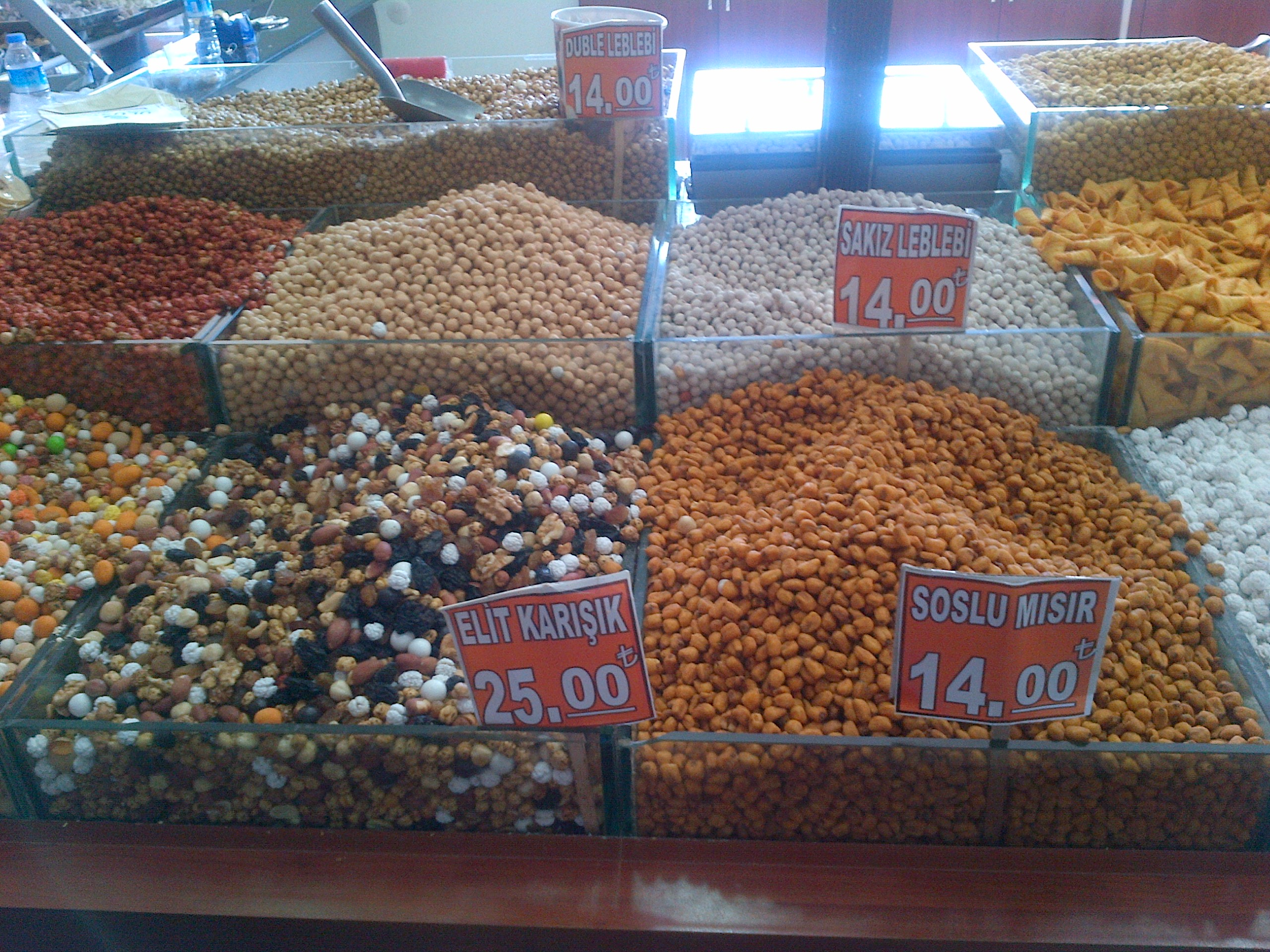 Kuruyemişçi vitrini